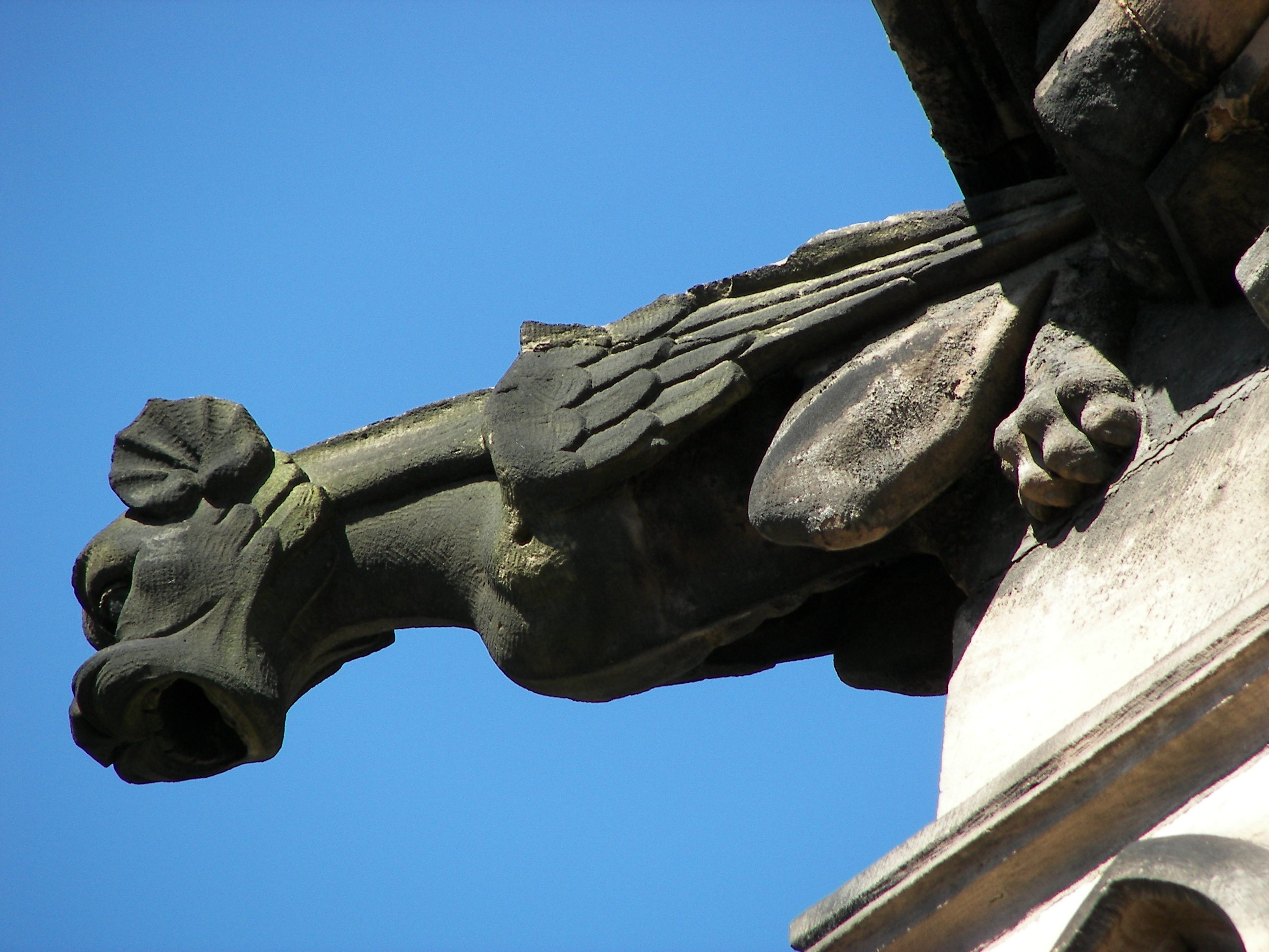 Marburg, Alte Universität, Wasserspeier